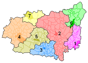 Áreas Funcionales de León (Castilla y León)